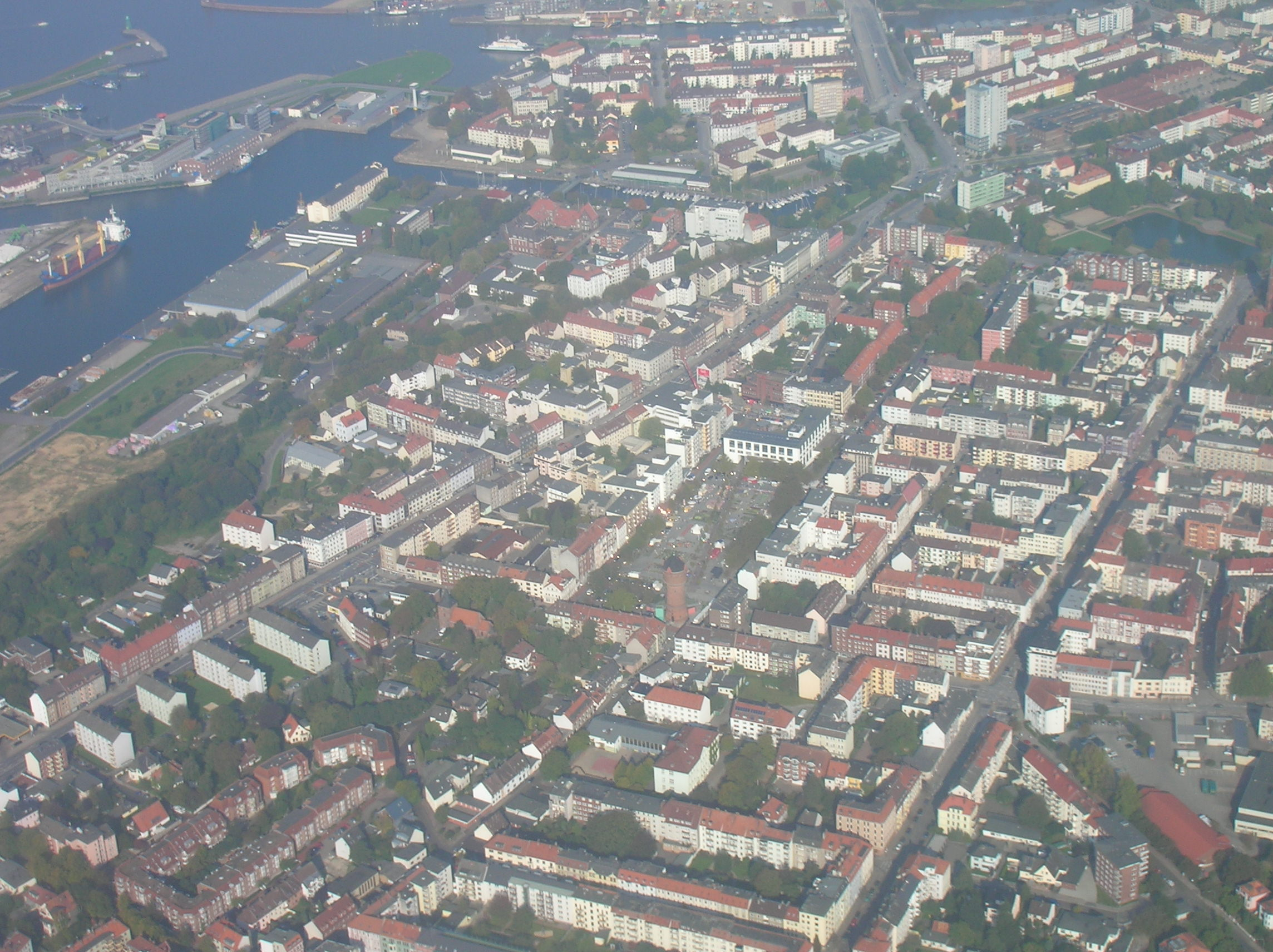 Luftbild von Geestemünde in Bremerhaven, aus Südsüdosten